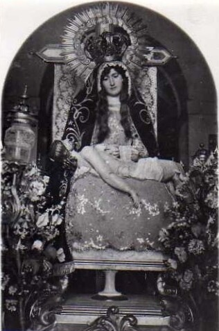 angustias